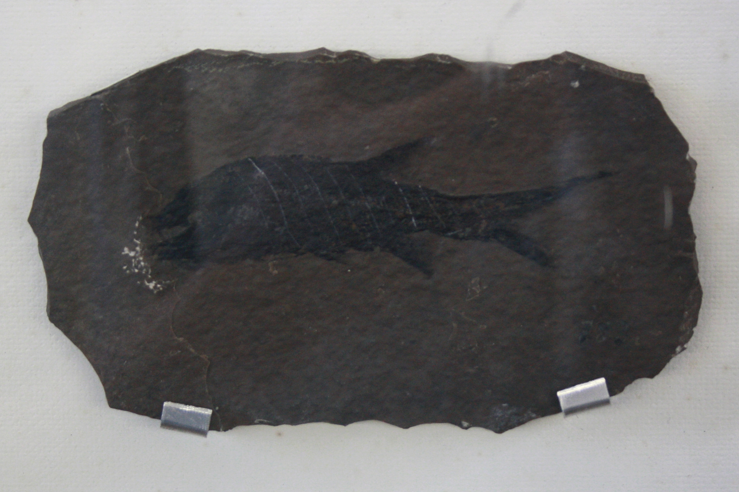 Národní muzeum v Praze na Václavském náměstí - paramblypterus sp. (Olivětín u Broumova)